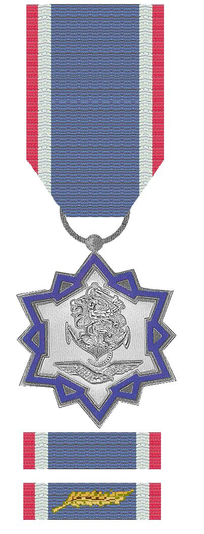 Ereteken van de Minister van Defensie, Nederland, 1987